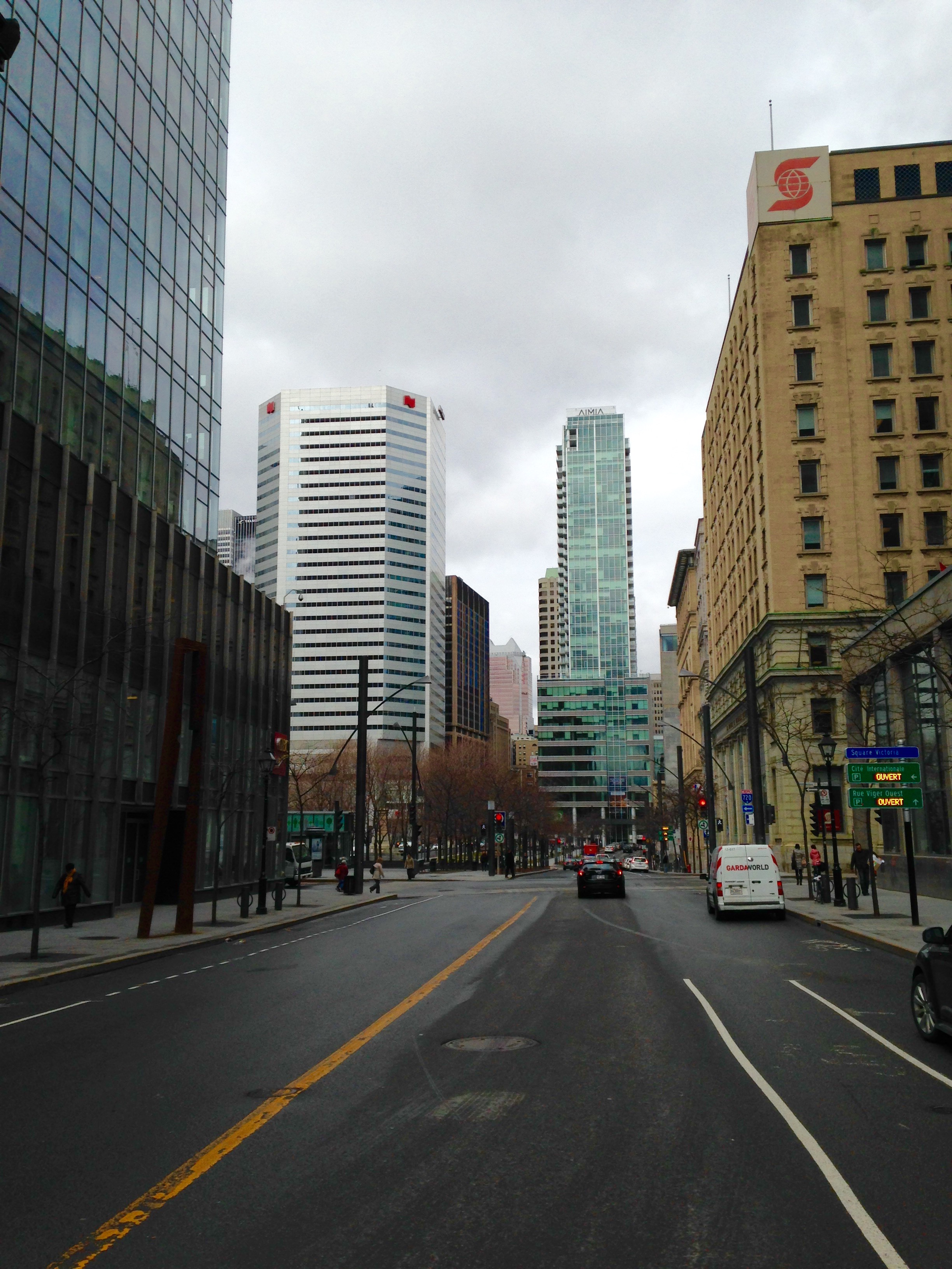 Rue McGill